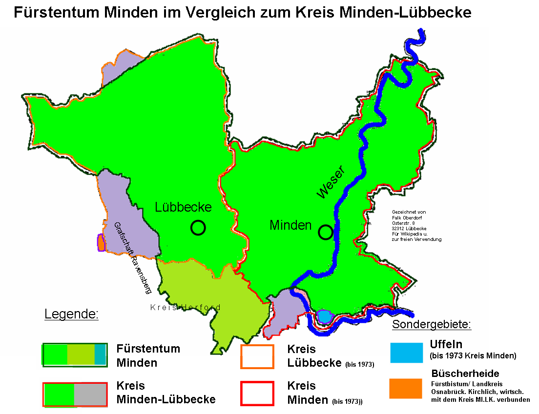 Vergleich der Territorien des Fstm Minden und des Kreis Minden-Lübbeckes